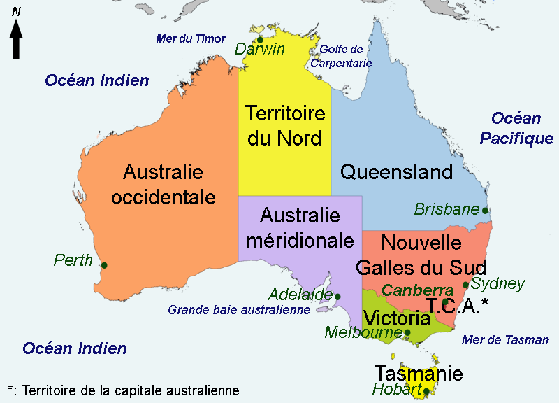 Carte des Etats australiens